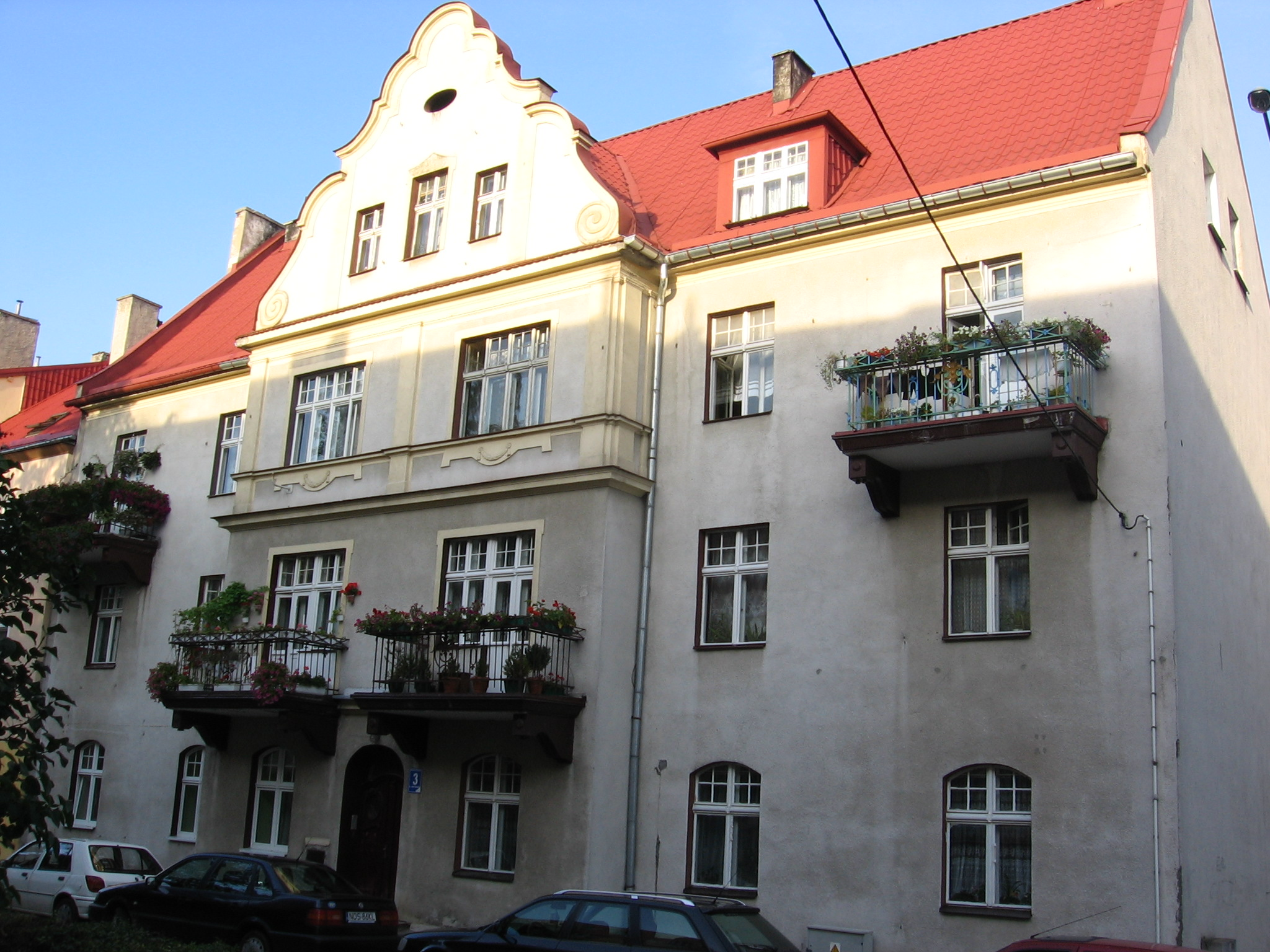 Ostróda, ul. Armii Krajowej 3 - dom (zabytek nr rejestr. A-1219)